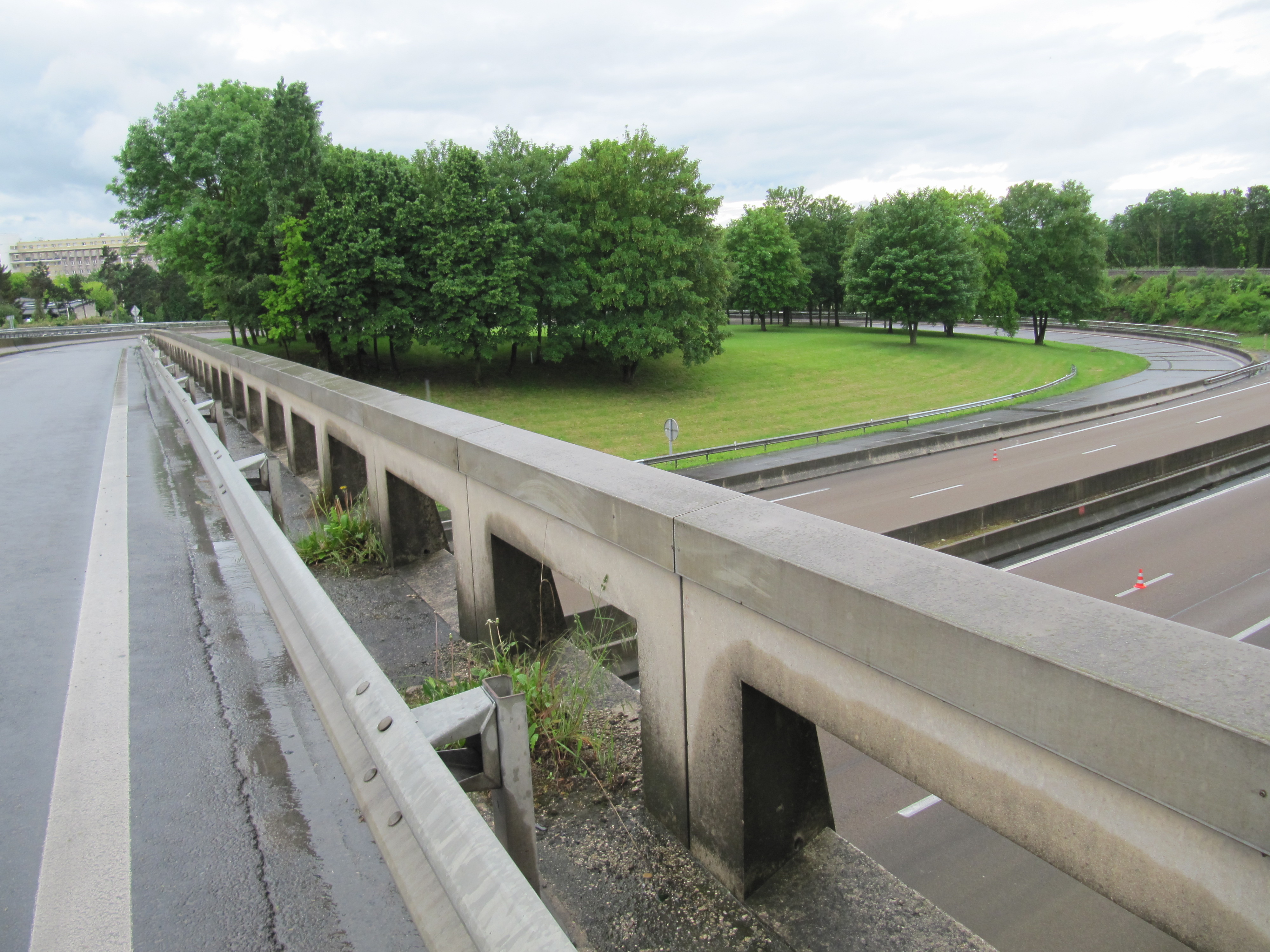 1,0 km par autoroute de 49.255503, 4.021124 à 49.251521, 4.020189 (pont et bretelle). La prochaine bretelle est Cathédrale.